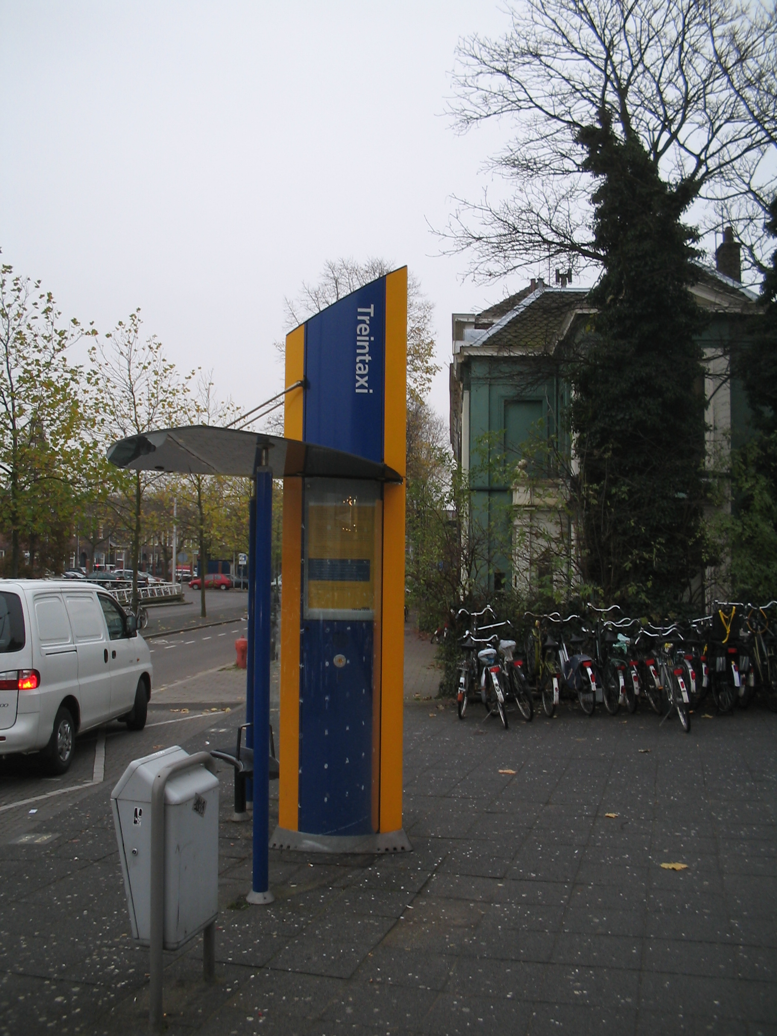 standplaats treintaxi, Delft